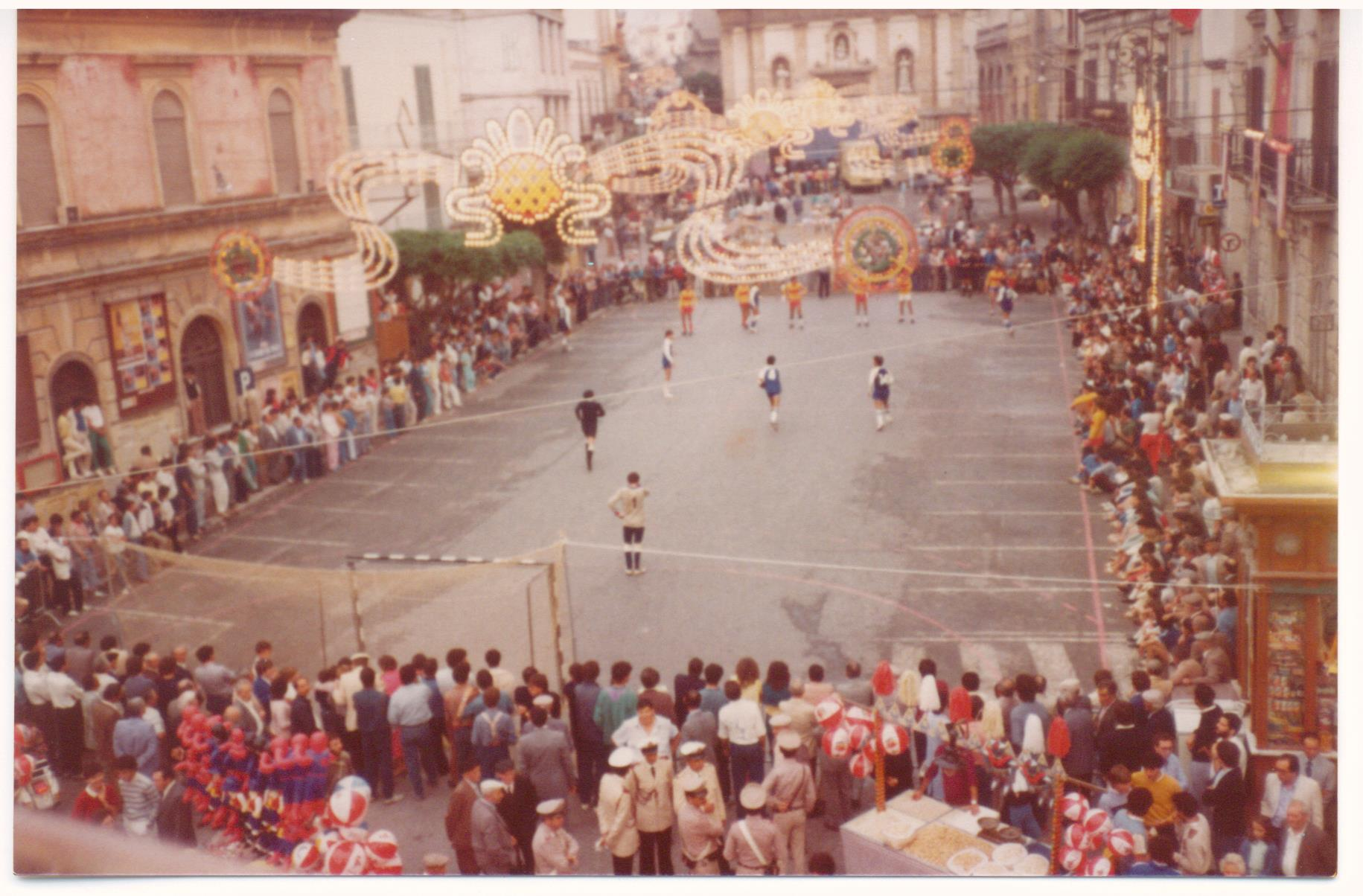 Partita di pallamano in Piazza Ciullo ad Alcamo